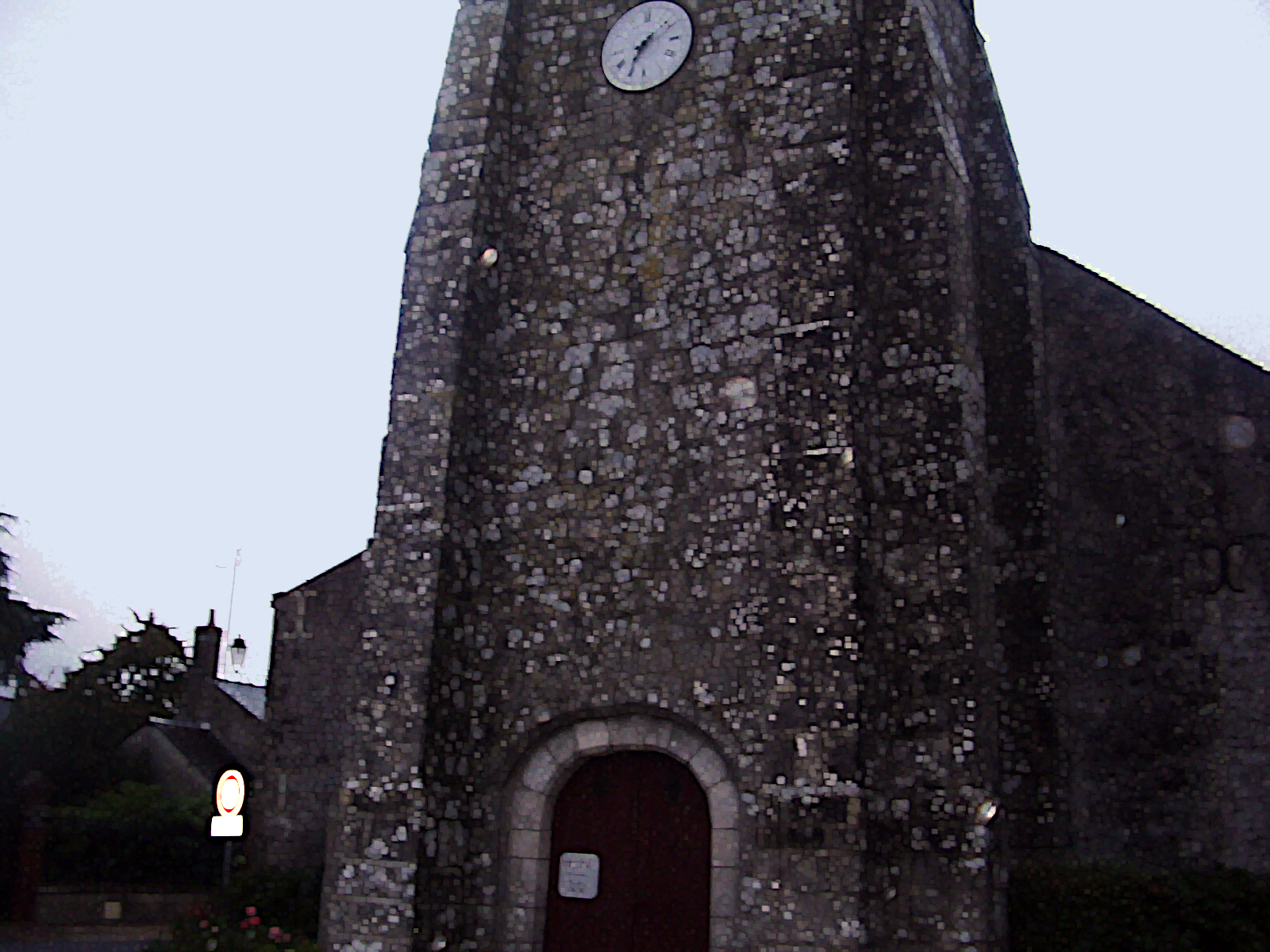 église de Cravant (Loiret)